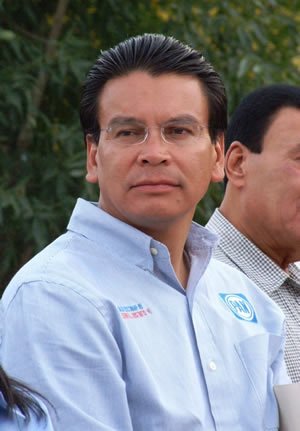 Juan Pablo Escobar Martínez